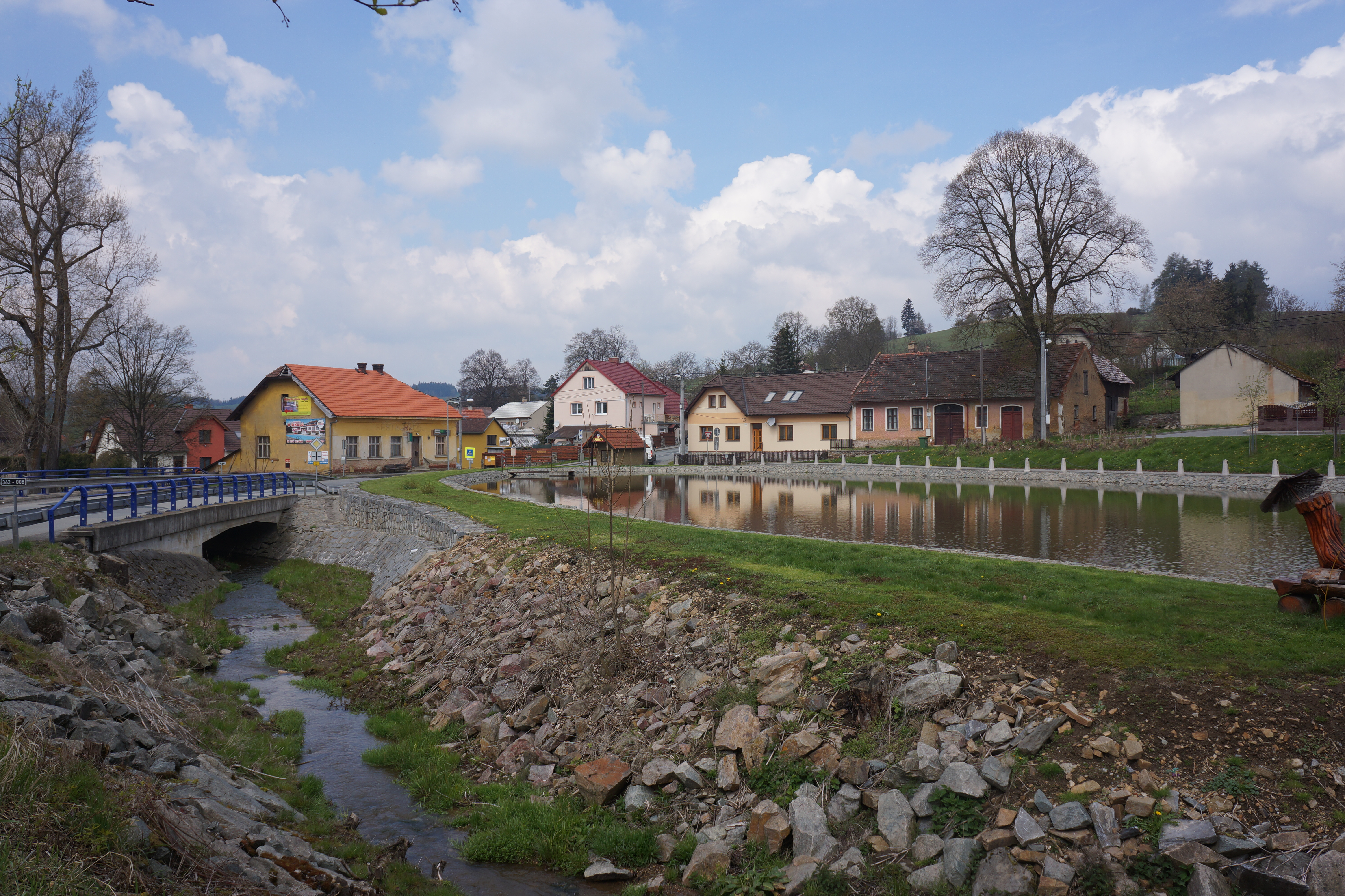 Pohled na obec Crhov s rybníkem